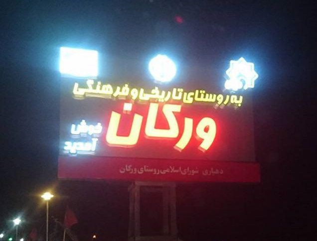 تابلو خوش آمد ورکان در شب تصویر آزاد است.